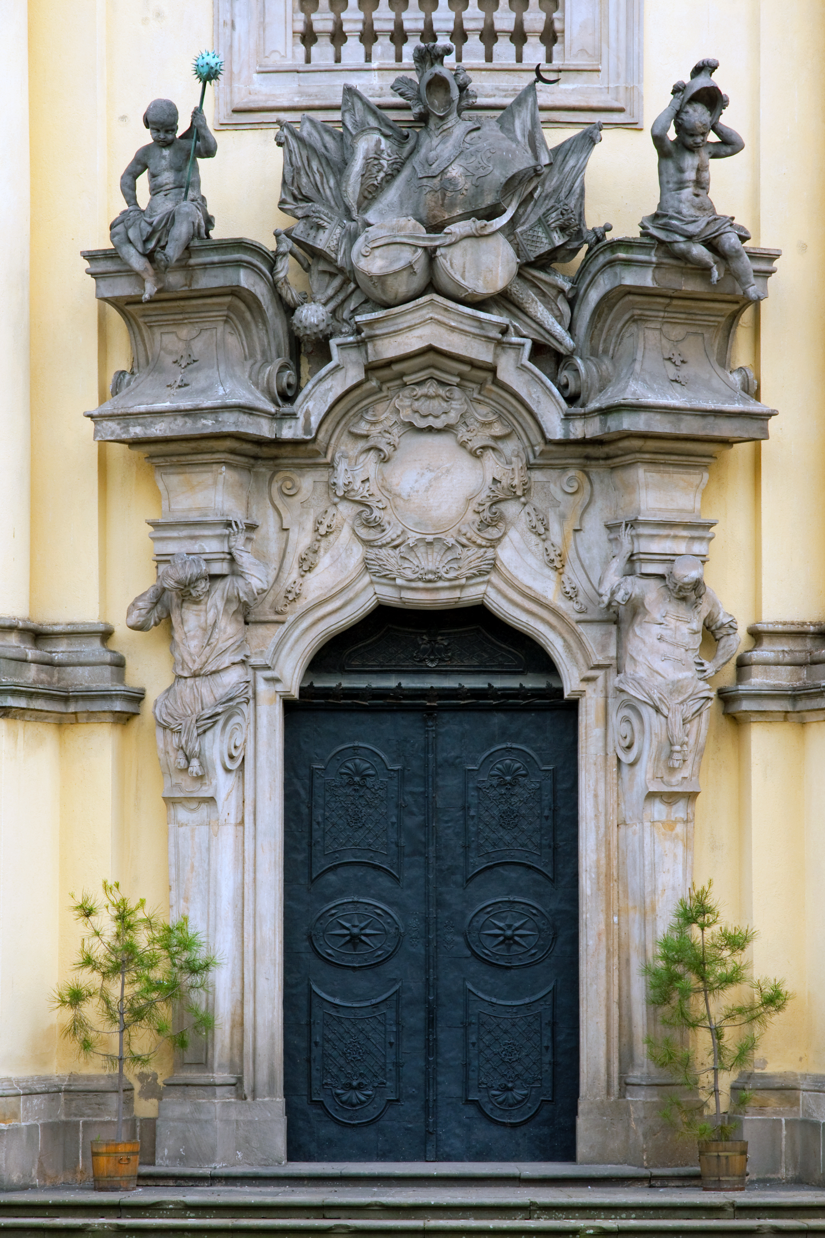 Sanktuarium Św. Jadwigi Śląskiej i św Bartłomieja w Trzebnicy